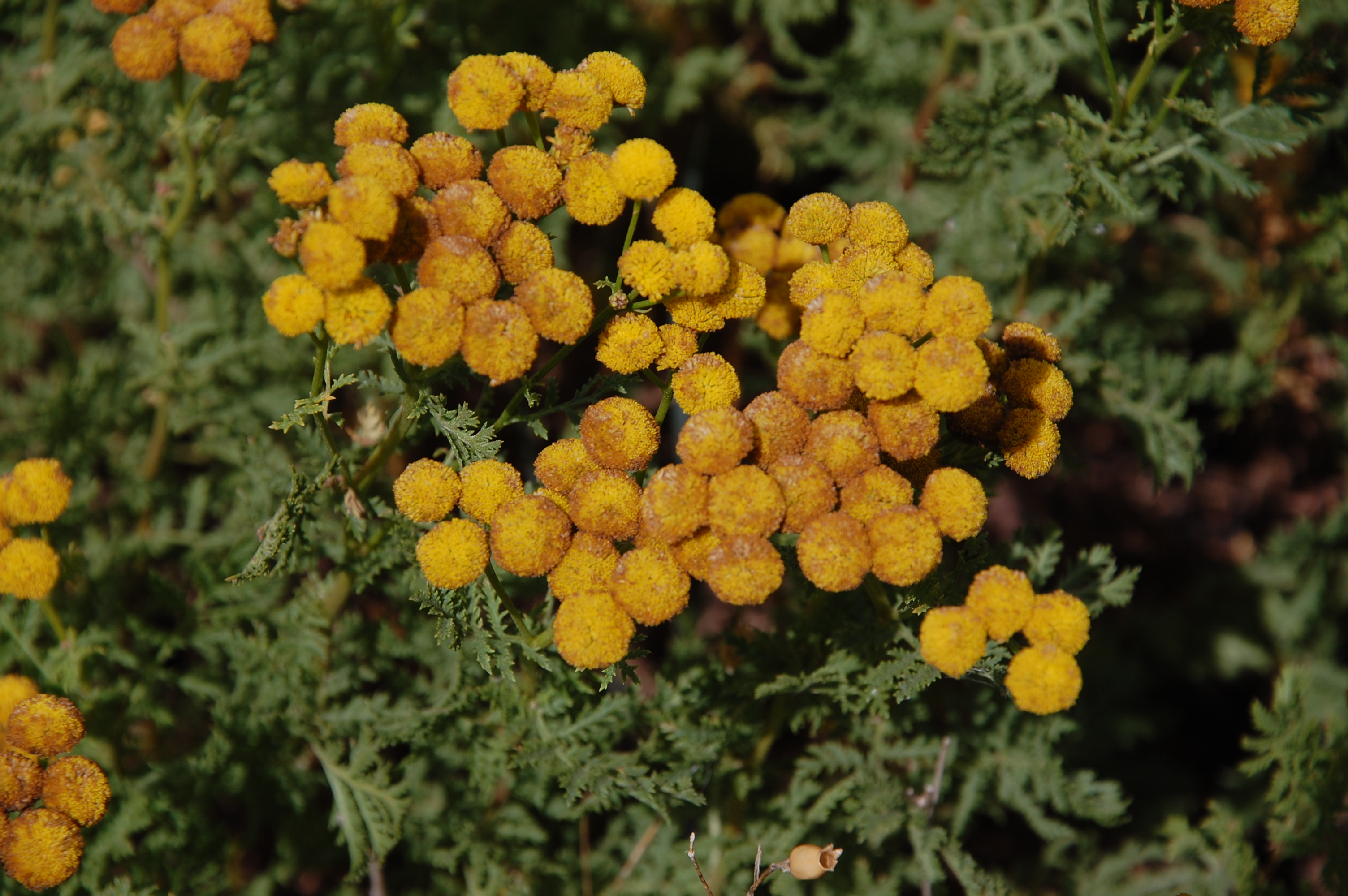 Tanacetum siculum (Guss.) Strobl, 1882Etna, Sicily